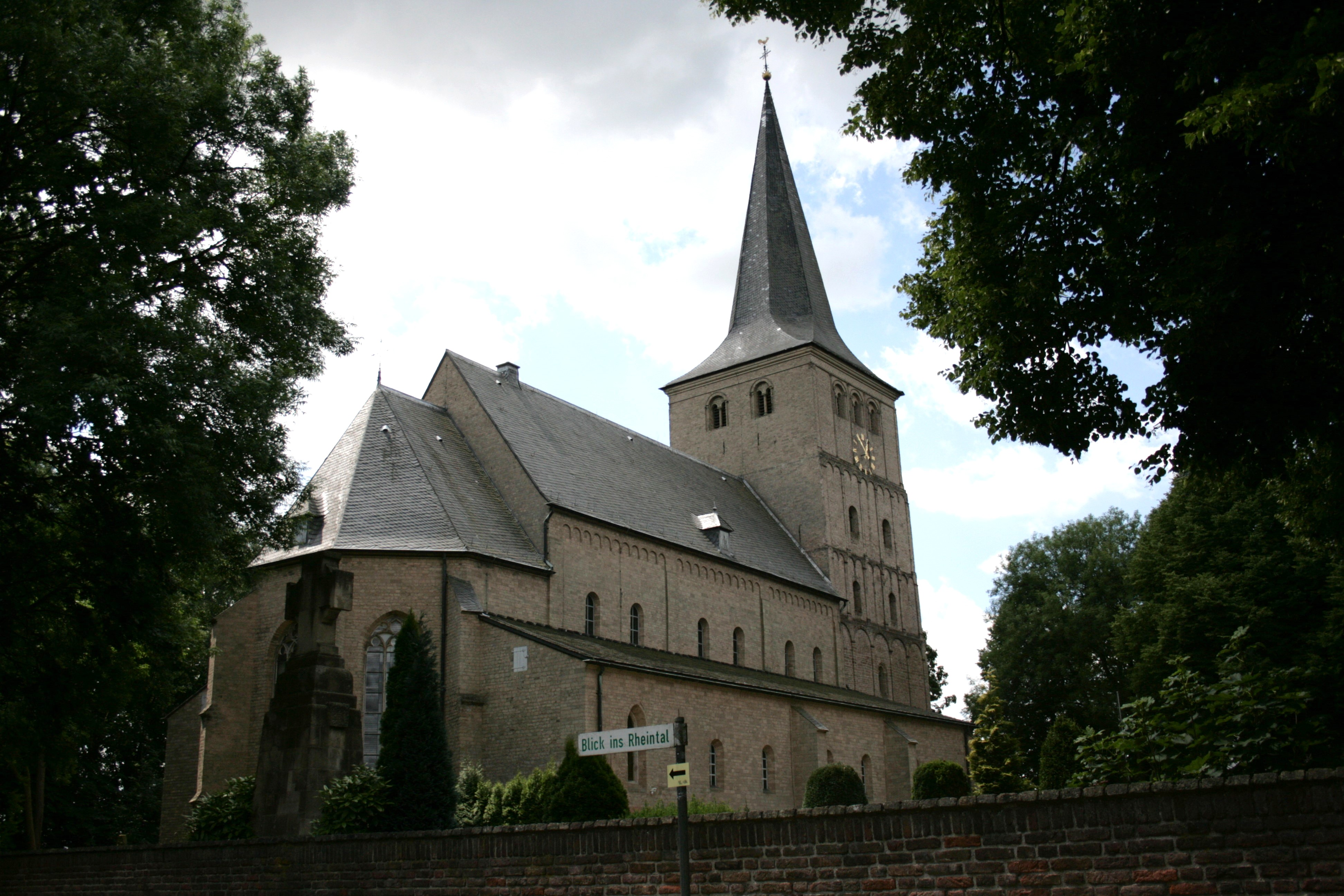 Stiftskirche St. Vitus in Hochelten, Emmerich am Rhein